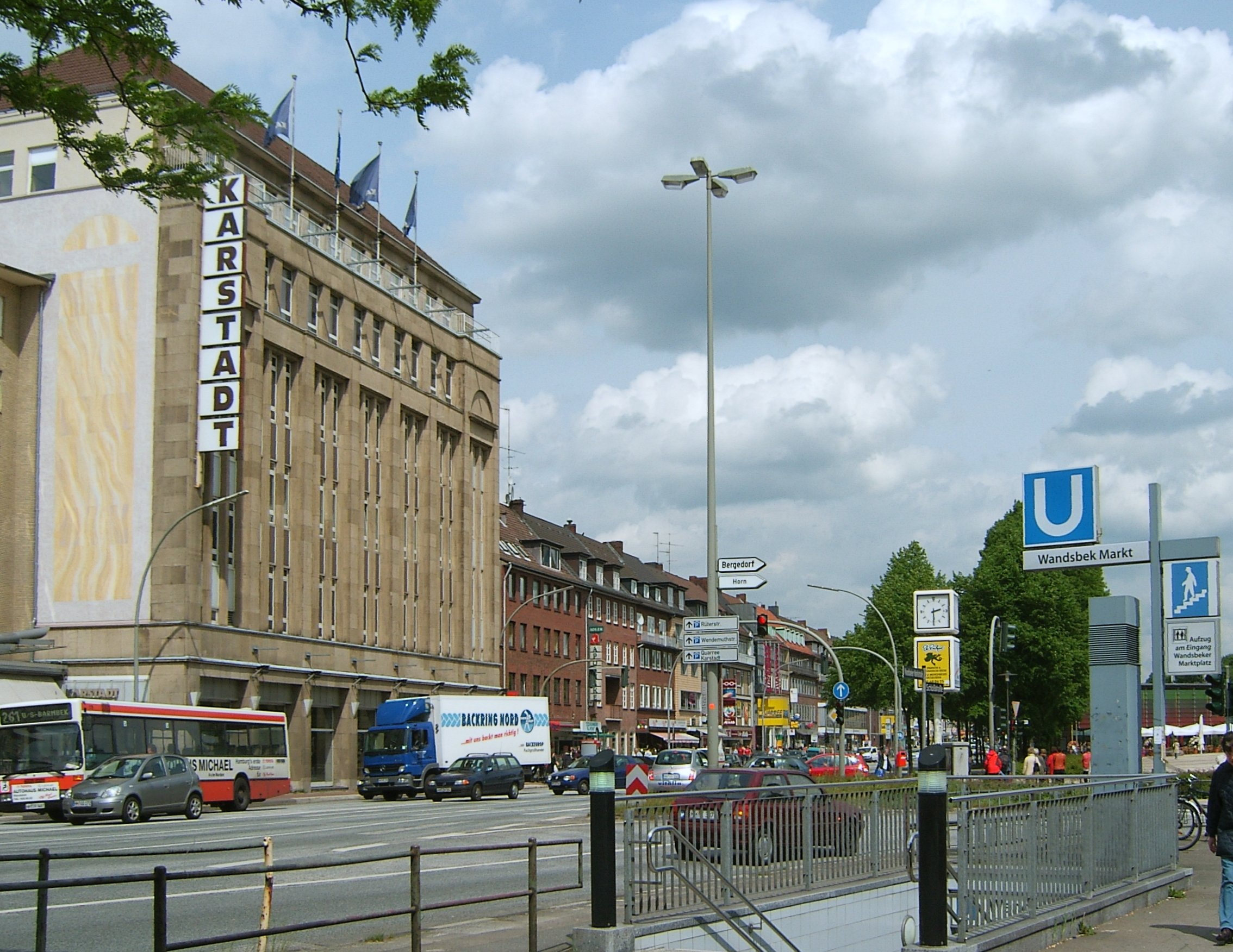 Wandsbek Markt, Zugang U-Bahnhof, Karstadt.